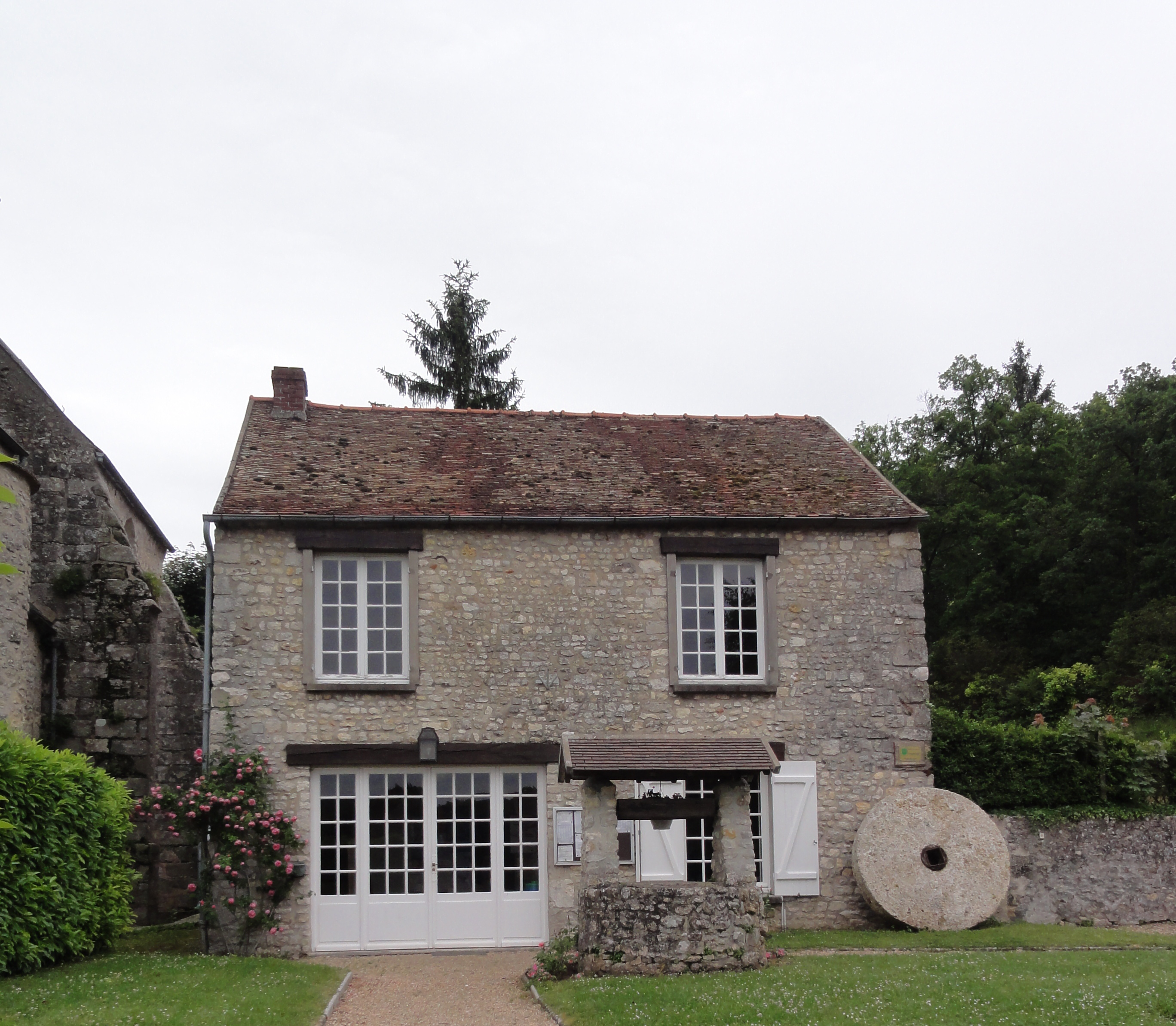 Hôtel de ville de Boissy-la-Rivière